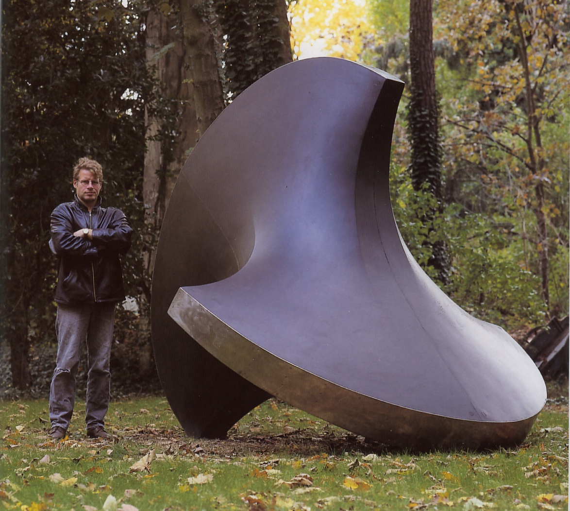 Maximilian Verhas, Bildhauer, Großer Rollkörper Nr. 1, Polyester und Edelstahl 250x300x250 cm, 1998